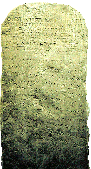 არმაზის ბილინგვა